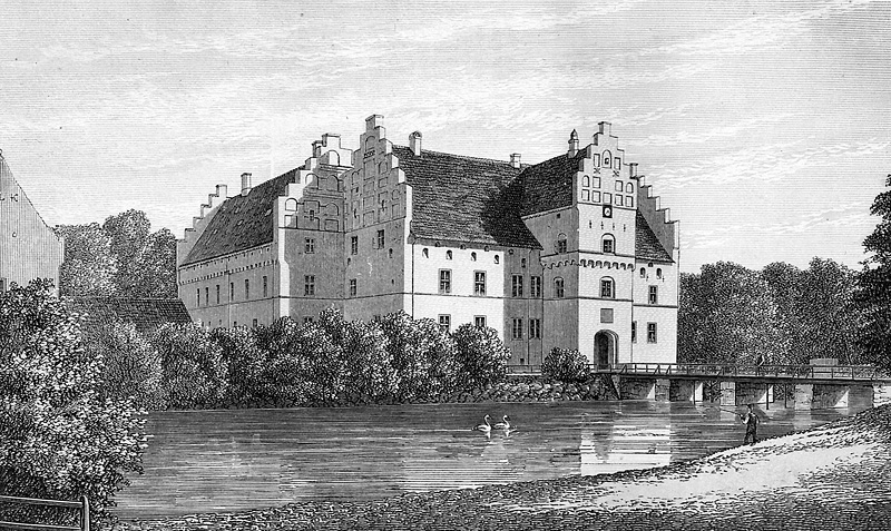 Gisselfeld er et af Danmarks største godser. Hovedgården er beliggende i Bråby Sogn i Haslev Kommune.